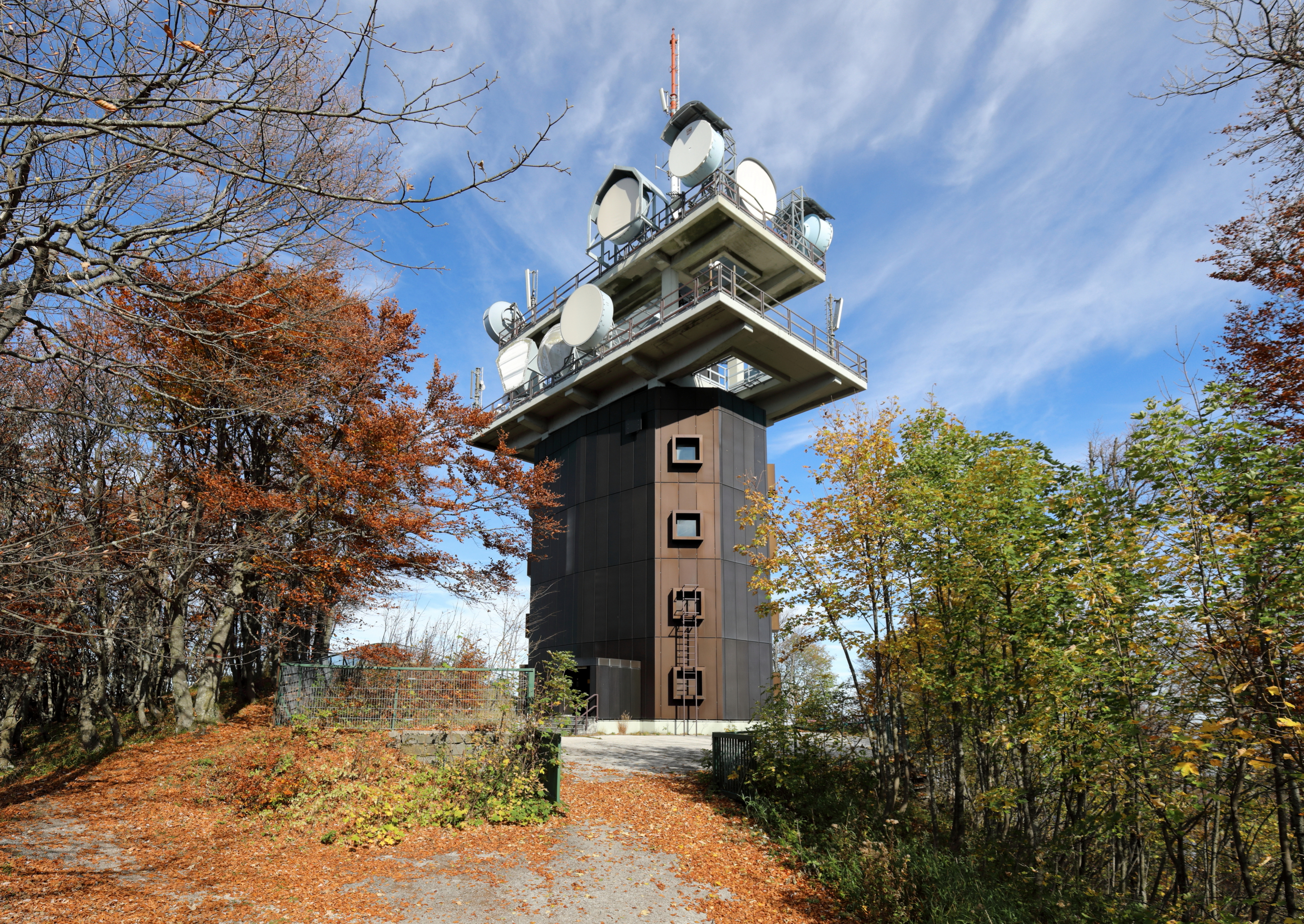 Südansicht des Richtfunkturmes auf dem Gipfel des Muckenkogels in der niederösterreichischen Stadtgemeinde Lilienfeld.Der Richtfunkturm gehört zum „Richtfunknetz Mitte“. Dieses Richtfunknetz umfasst eine zweite Richtfunkstrecke von Wien nach Feldkirch sowie eine Alpenquerung zwischen Salzburg und Klagenfurt. Aufgebaut wurde es ab 1973 mittels 22 neuen Relaisstationen. 15 davon sind im einheitlichen Stil errichtet, unter anderem die Station auf dem Muckenkogel. Eröffnet wurde das neue Richtfunknetz 1981 (Streckenteil Wien-Roßbrand sowie Salzburg-Roßbrand-Klagenfurt).